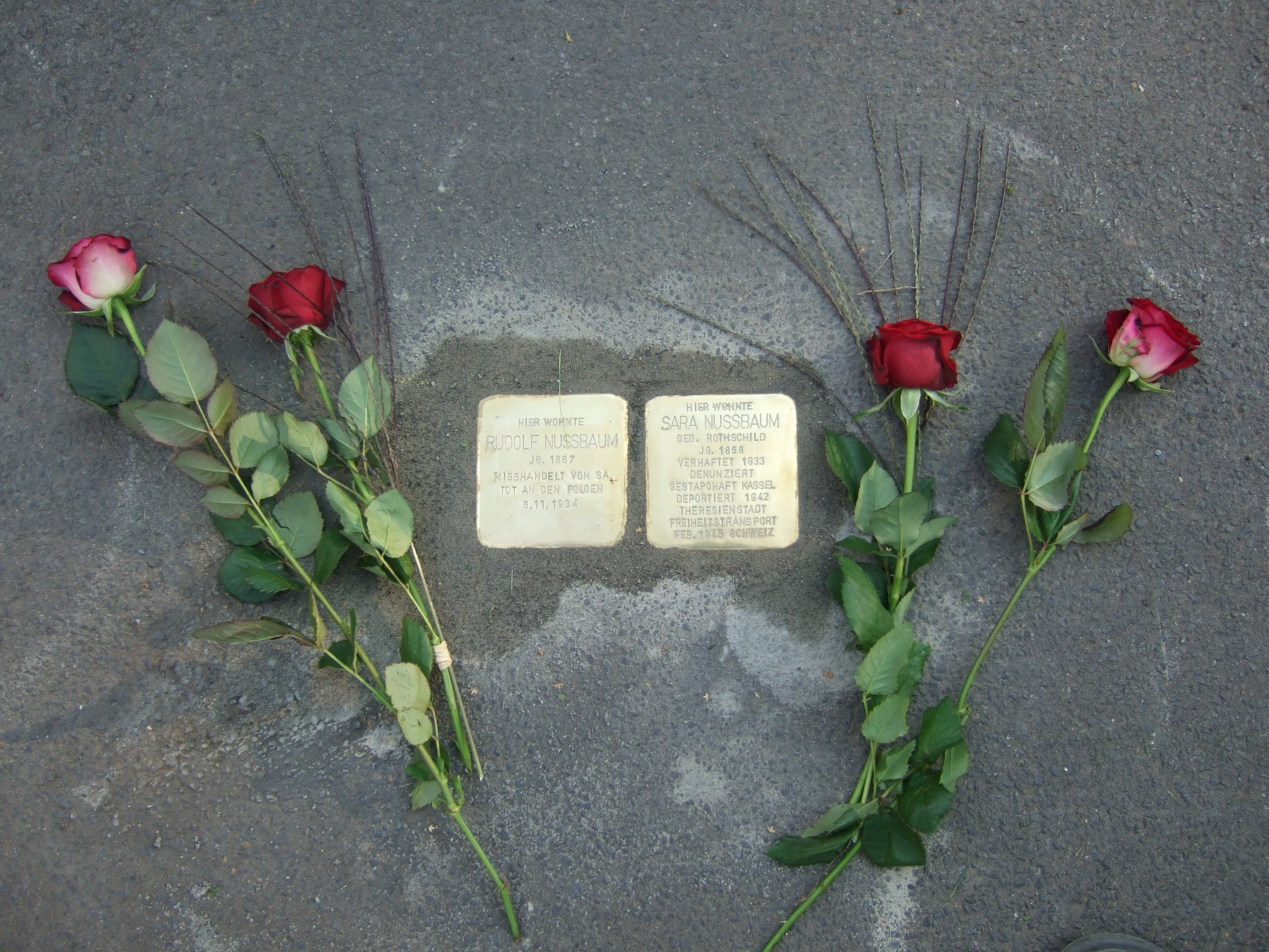 Frisch verlegter Stolperstein mit Rosen